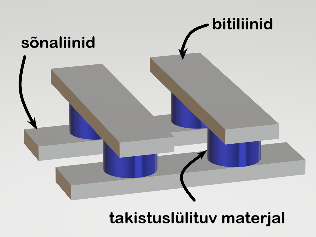 takistusmälu ristmaatriks